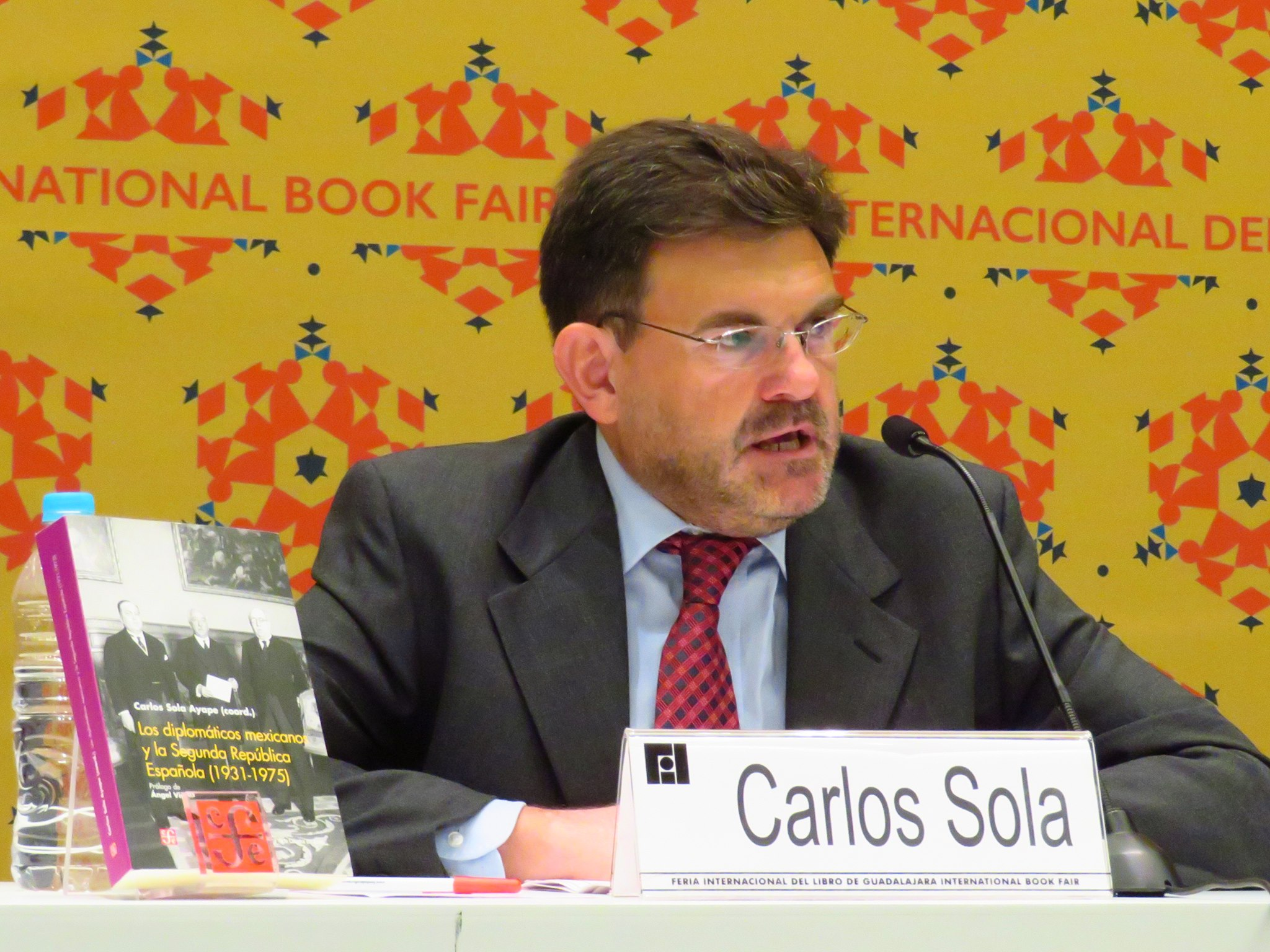 Carlos Sola Ayape en la presentación de su último libro publicado por el Fondo de Cultura Económica.